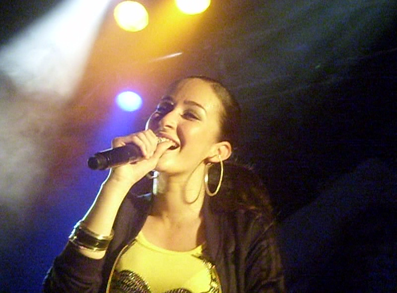 Kenza Farah en concert à l'espace Julien de Marseille le 15 mai 2009